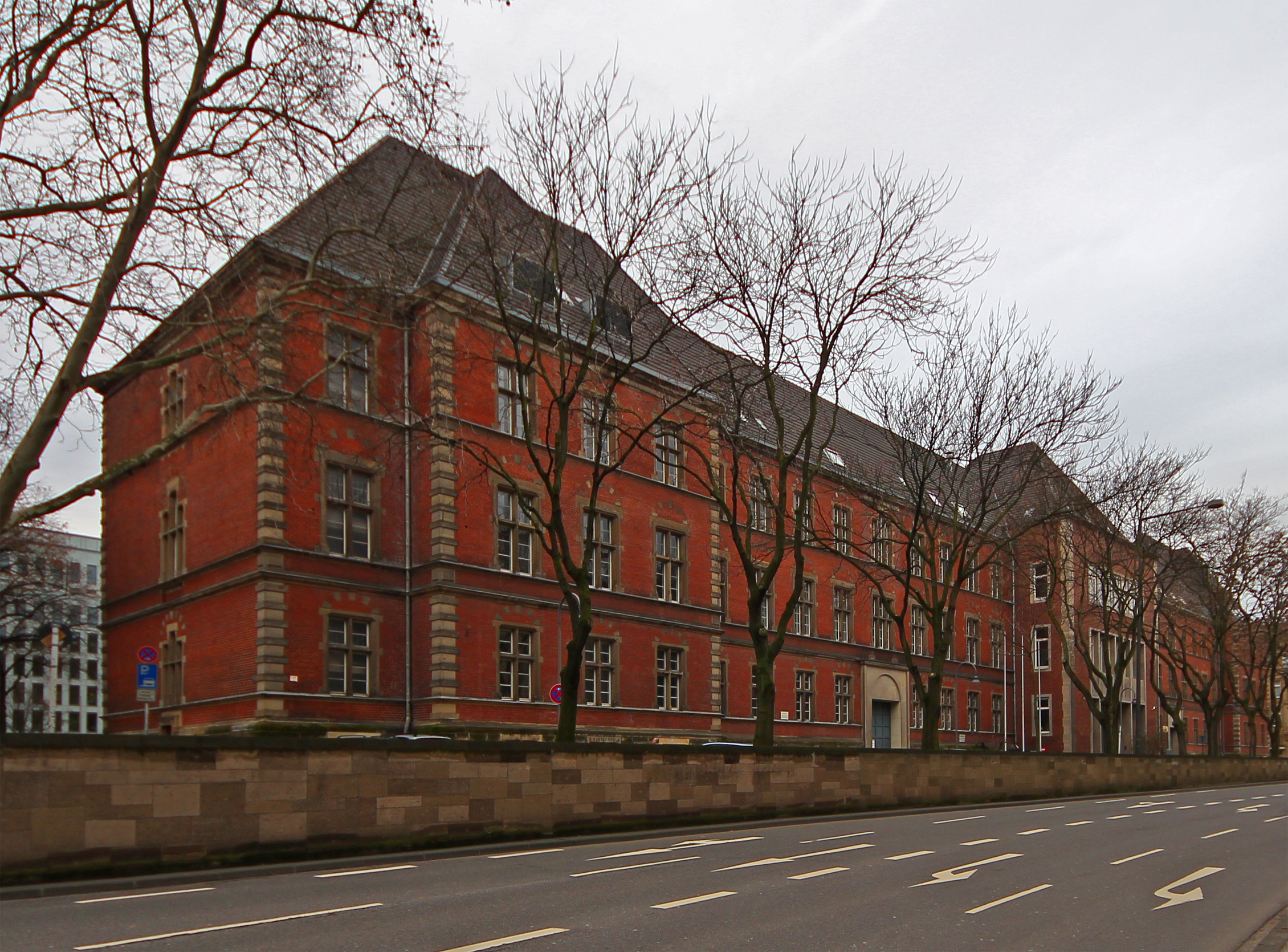 Das Justizgebäude am Appellhofplatz in der Kölner Altstadt